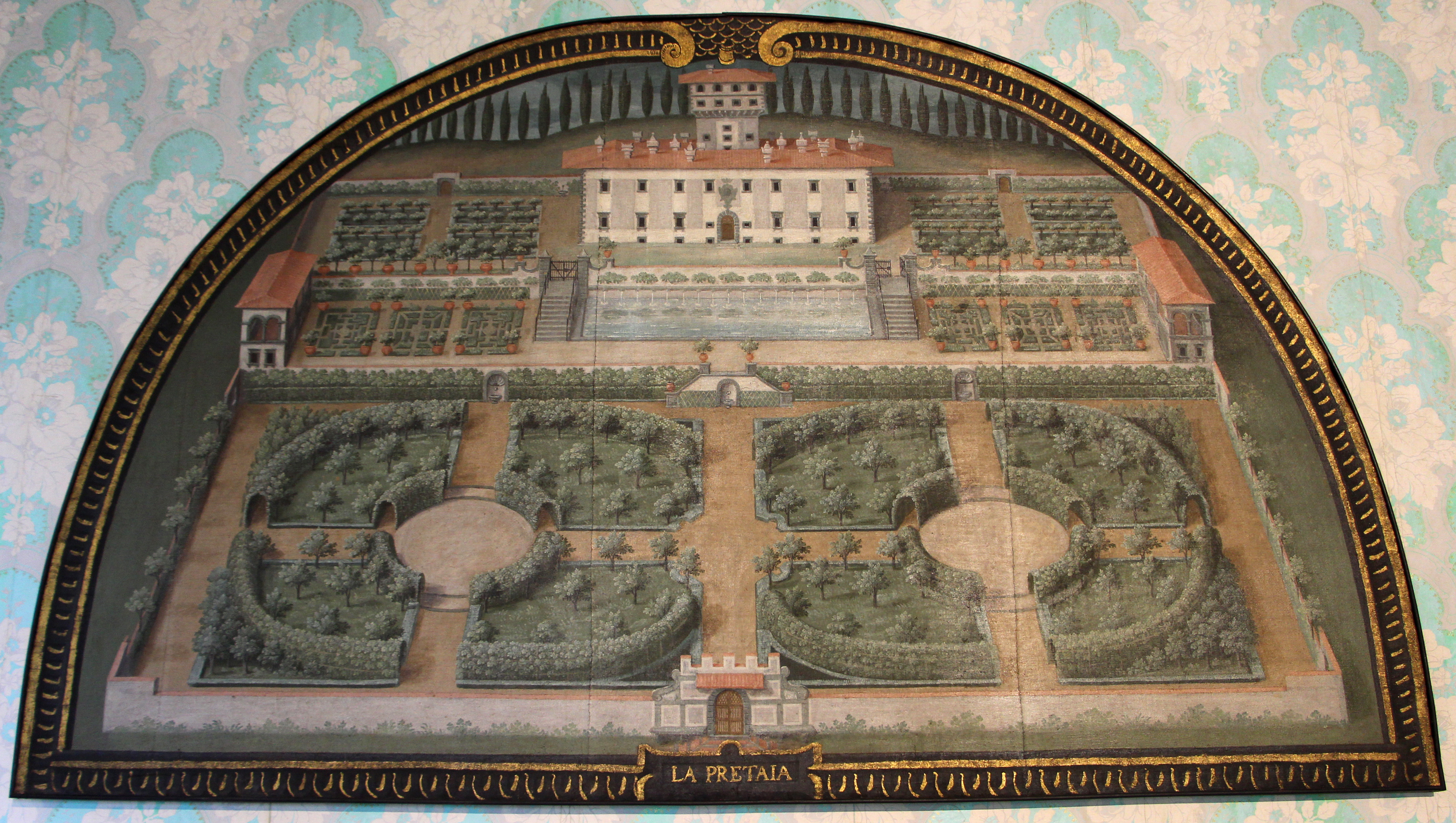 Villa medicea della Petraia - MIBAC The making of this document was supported by Wikimedia CH. (Submit your project!) For all the files concerned, please see the category Supported by Wikimedia CH. This is a photo of a monument which is part of cultural heritage of Italy.